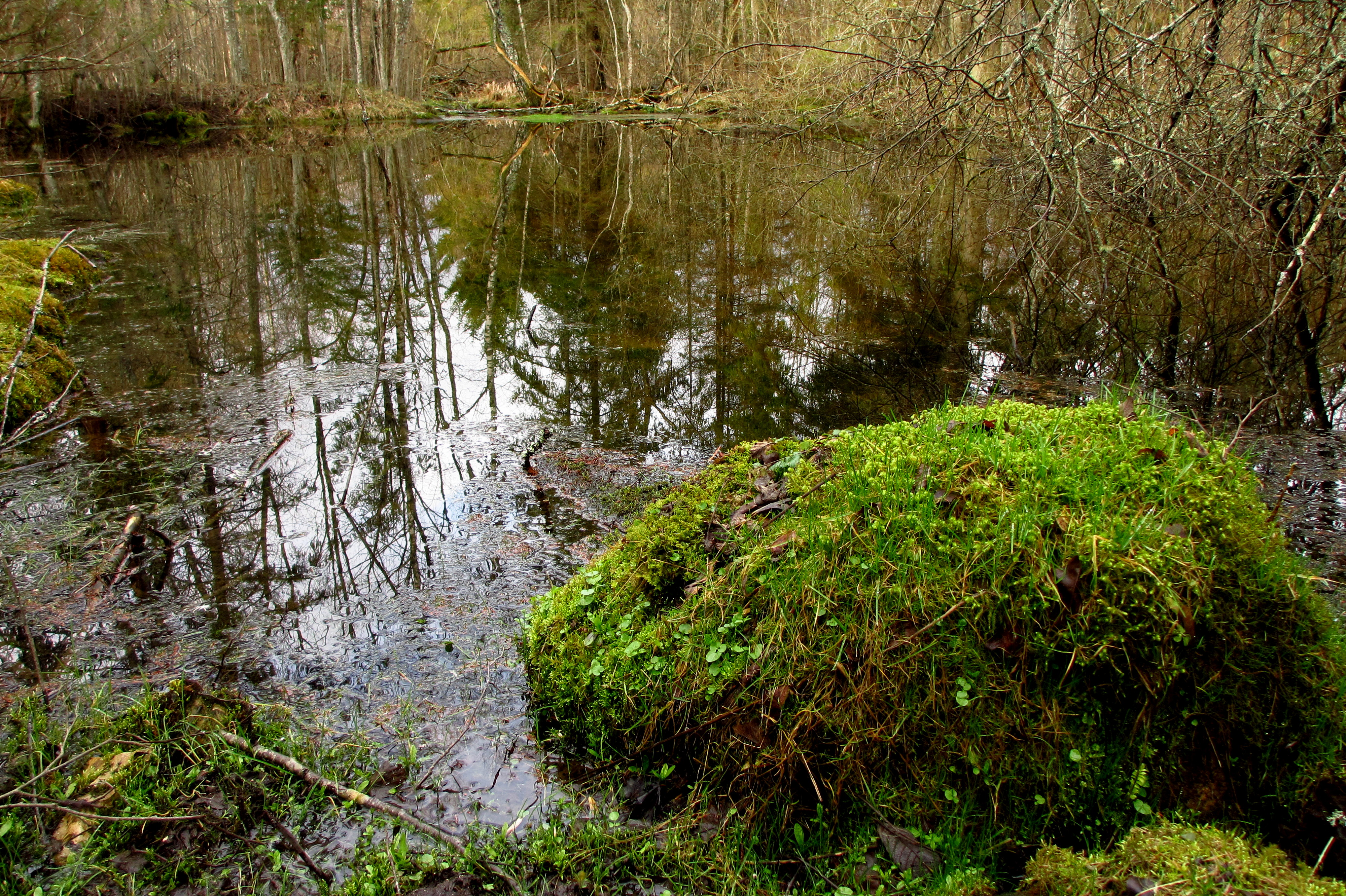 Tammiku looduskaitseala